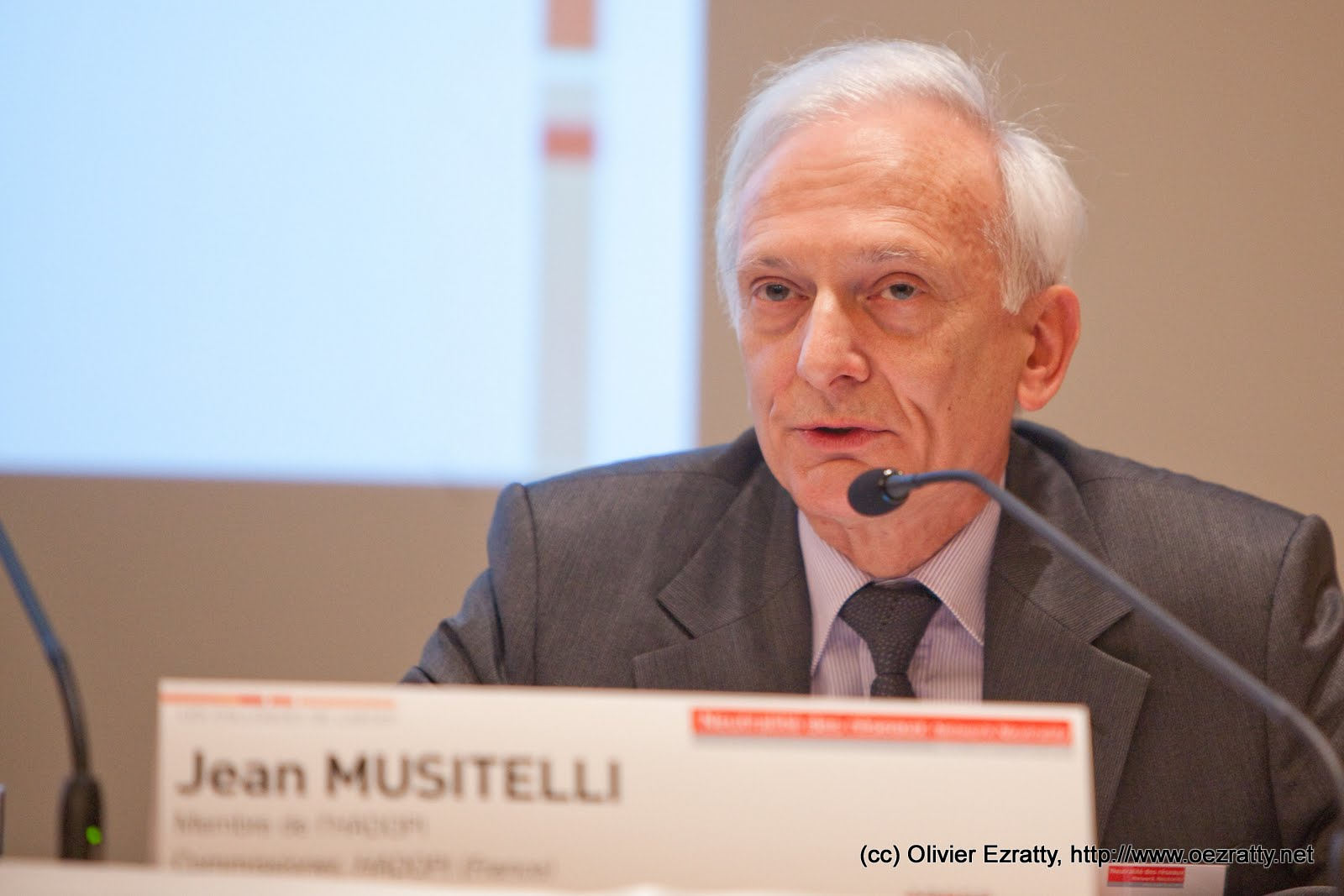 Jean Musitelli lors du colloque ARCEP Neutralité des Réseaux